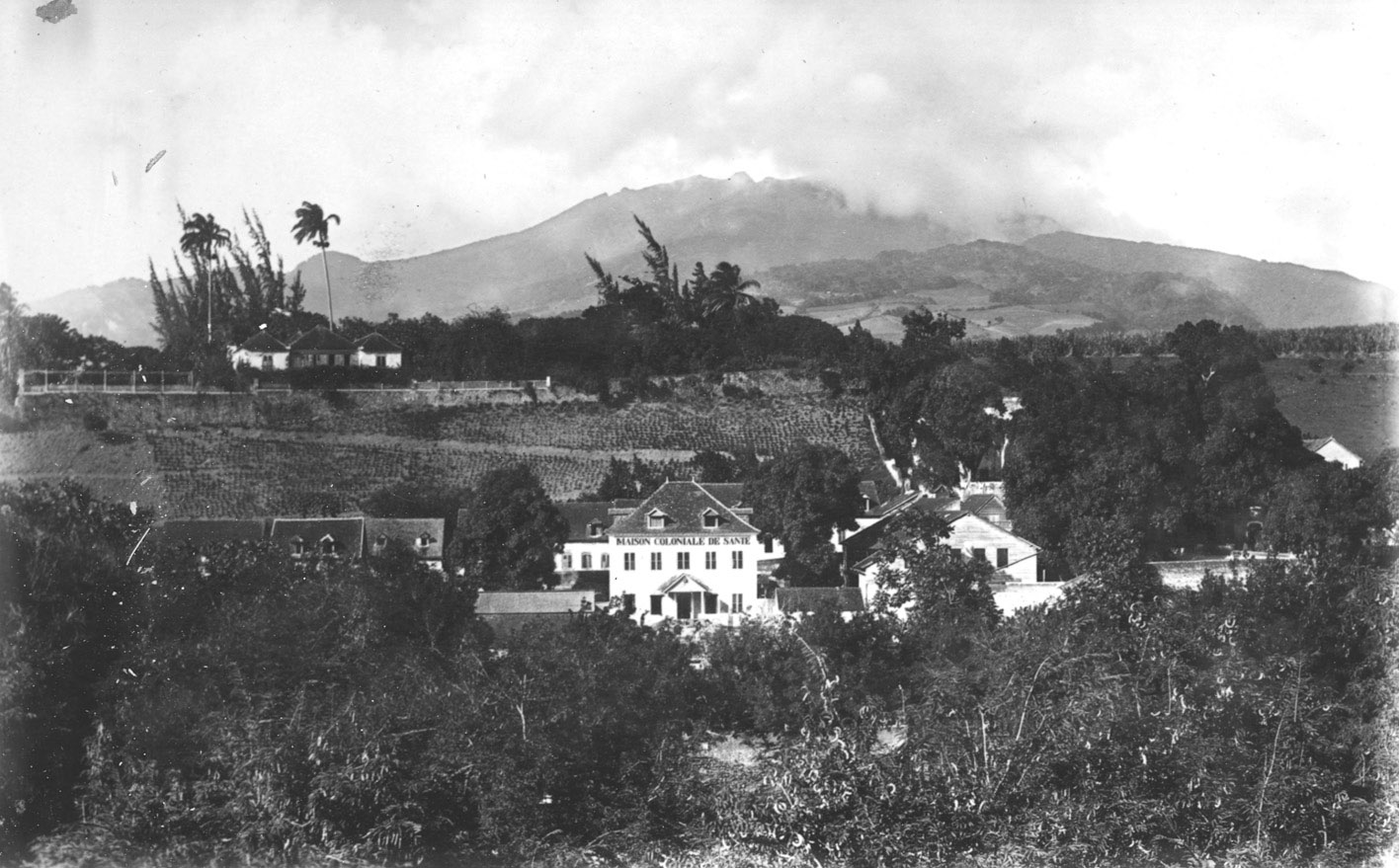 Pitons du Carbet et Maison Coloniale de Santé de Saint-Pierre de la Martinique. Vue prise des boulevards extérieurs en 1889.